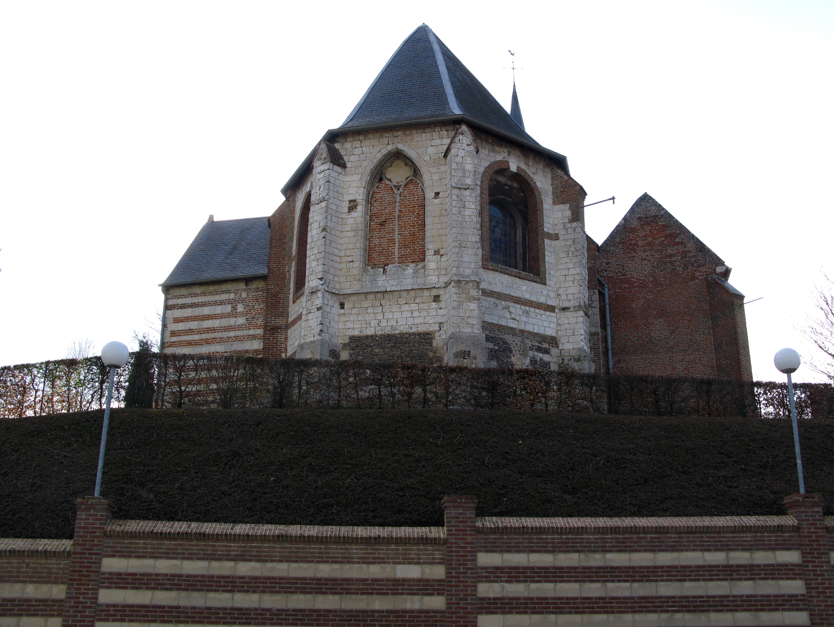 Mons-Boubert (Somme, France) - Le chevet de l'église.